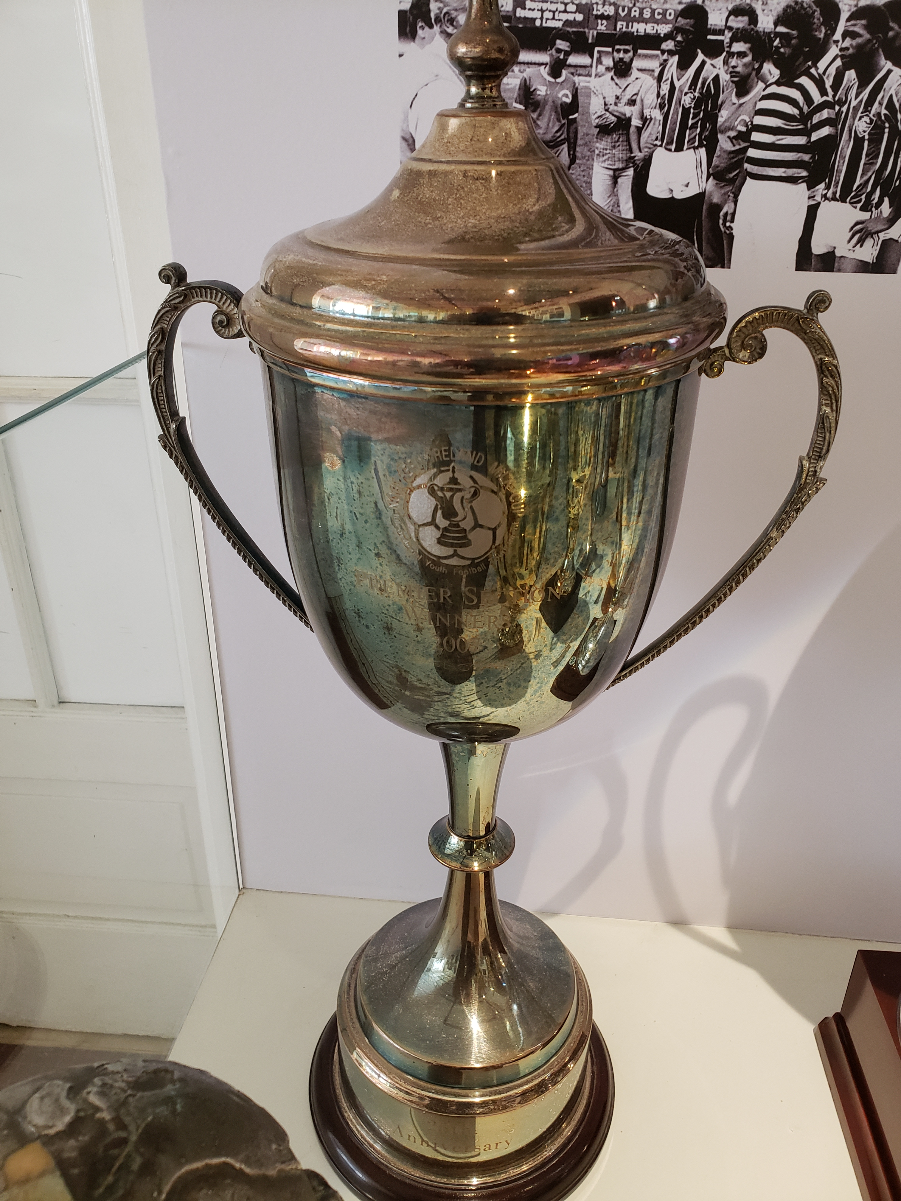 Taça Milk Cup Sub-16 de 2007, competição disputada na Irlanda do Norte e vencida pelo Fluminense Football Club.